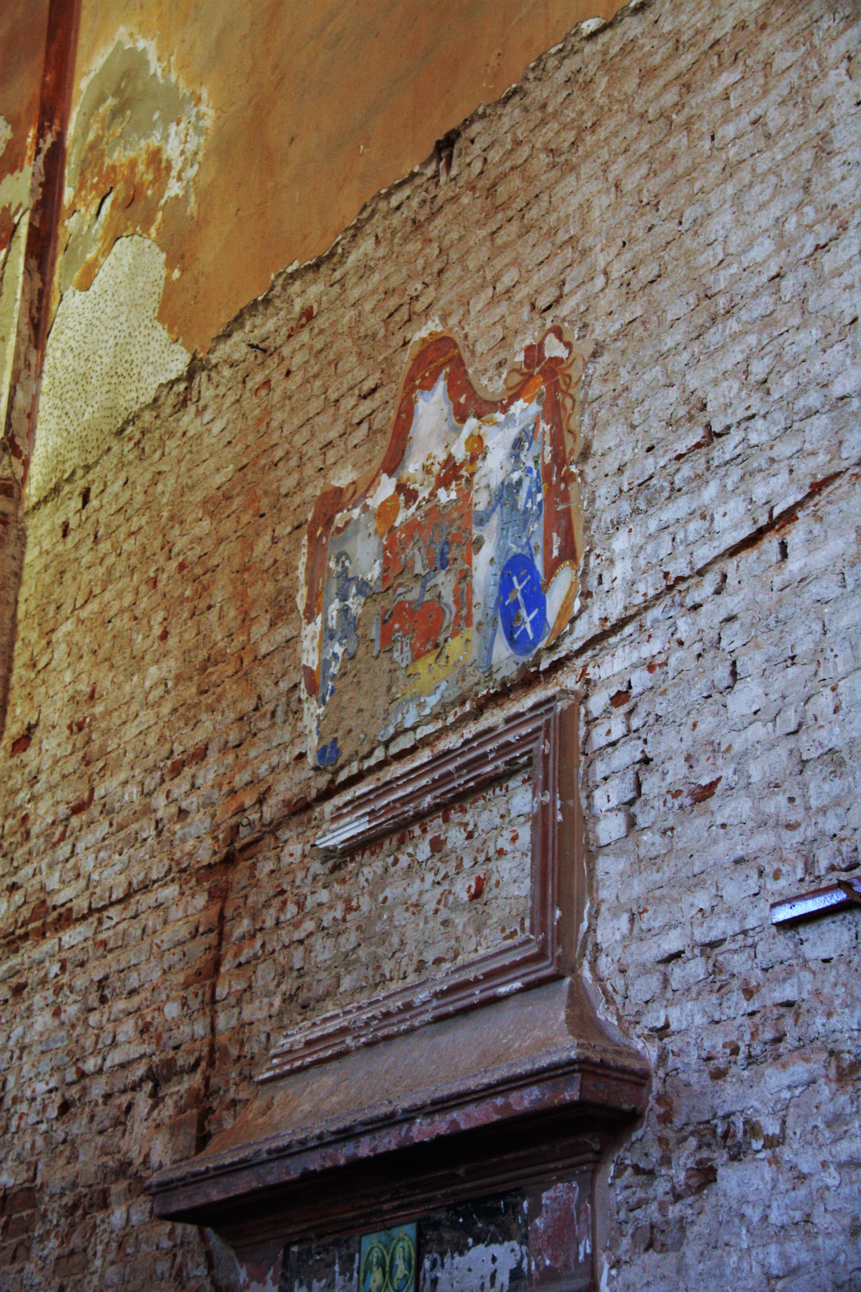 Костел Благовіщення Пресвятої Богородиці, Клевань